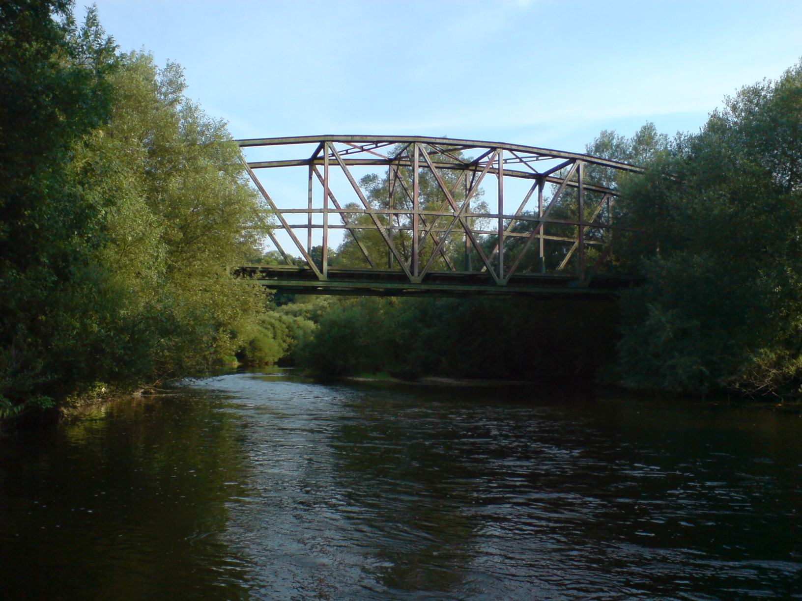 Brücke der stillgelegten Jagsttalbahn bei Winzenhofen